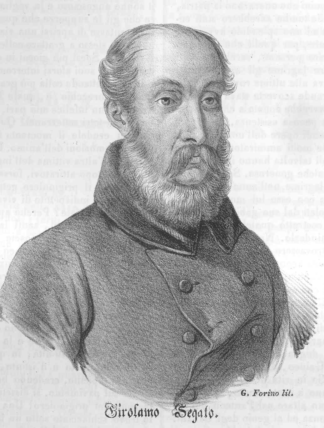 autore: G. Forino litografo, Poliorama Pittoresco n. 144 del 12 giugno 1841, ritratto di Girolamo Segato, autore, opera il cui autore è morto da più di 70 anni, acquisita da scanner